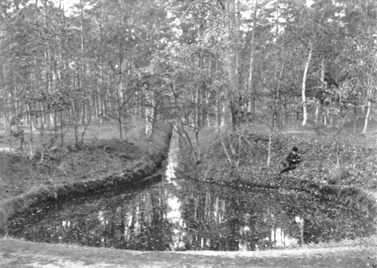 De Koekenpan (foto circa 1910, J.W. Kraal)